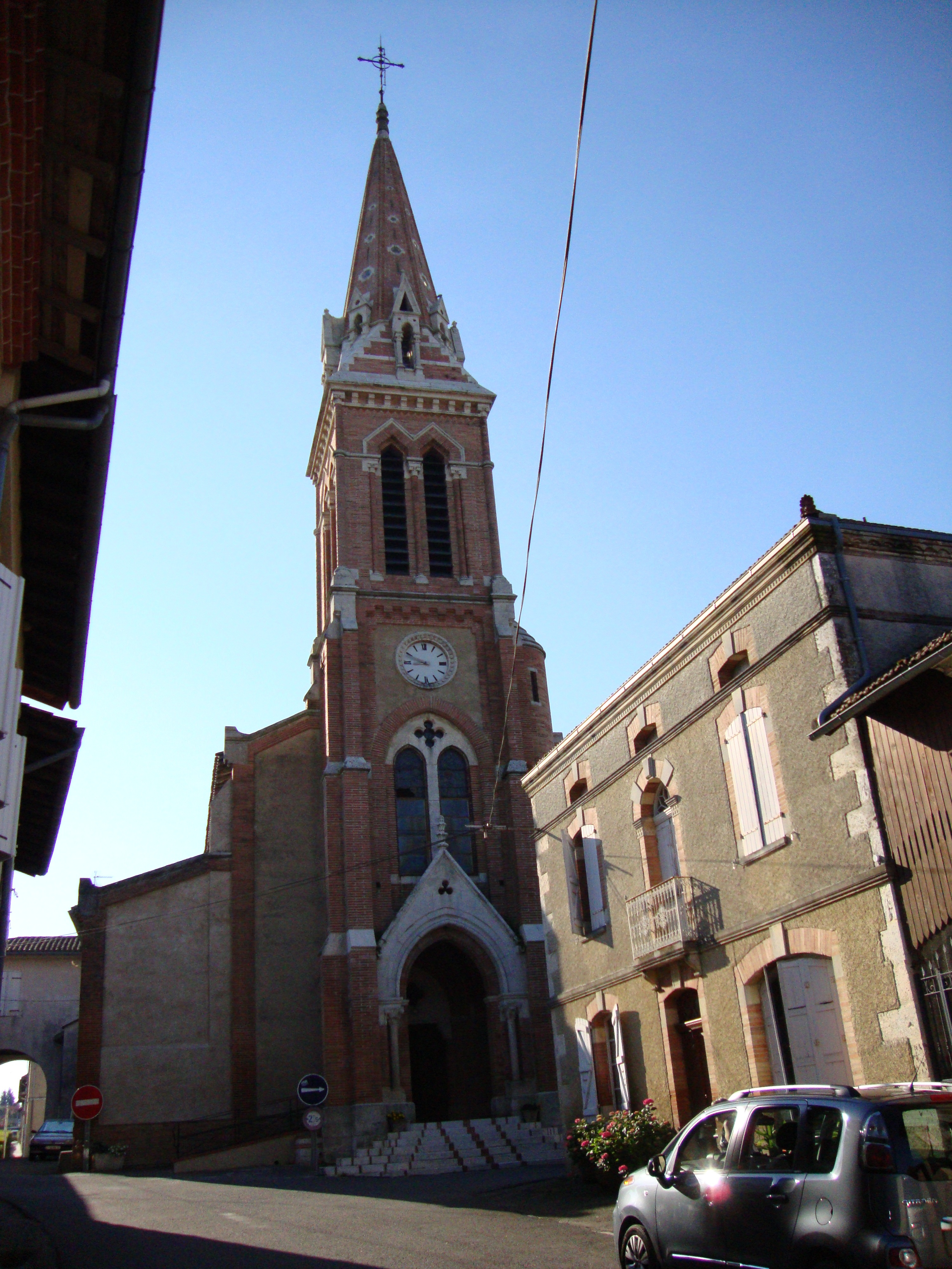 Monferran-Savès (Gers, Fr) église côté façade